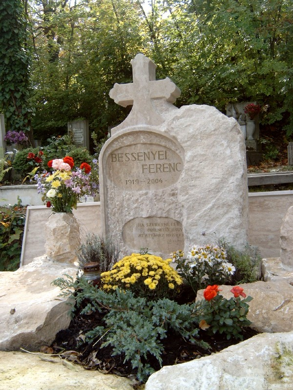 Bessenyei Ferenc sírja Budapesten. Farkasréti temető: 21/1-1-73/74.